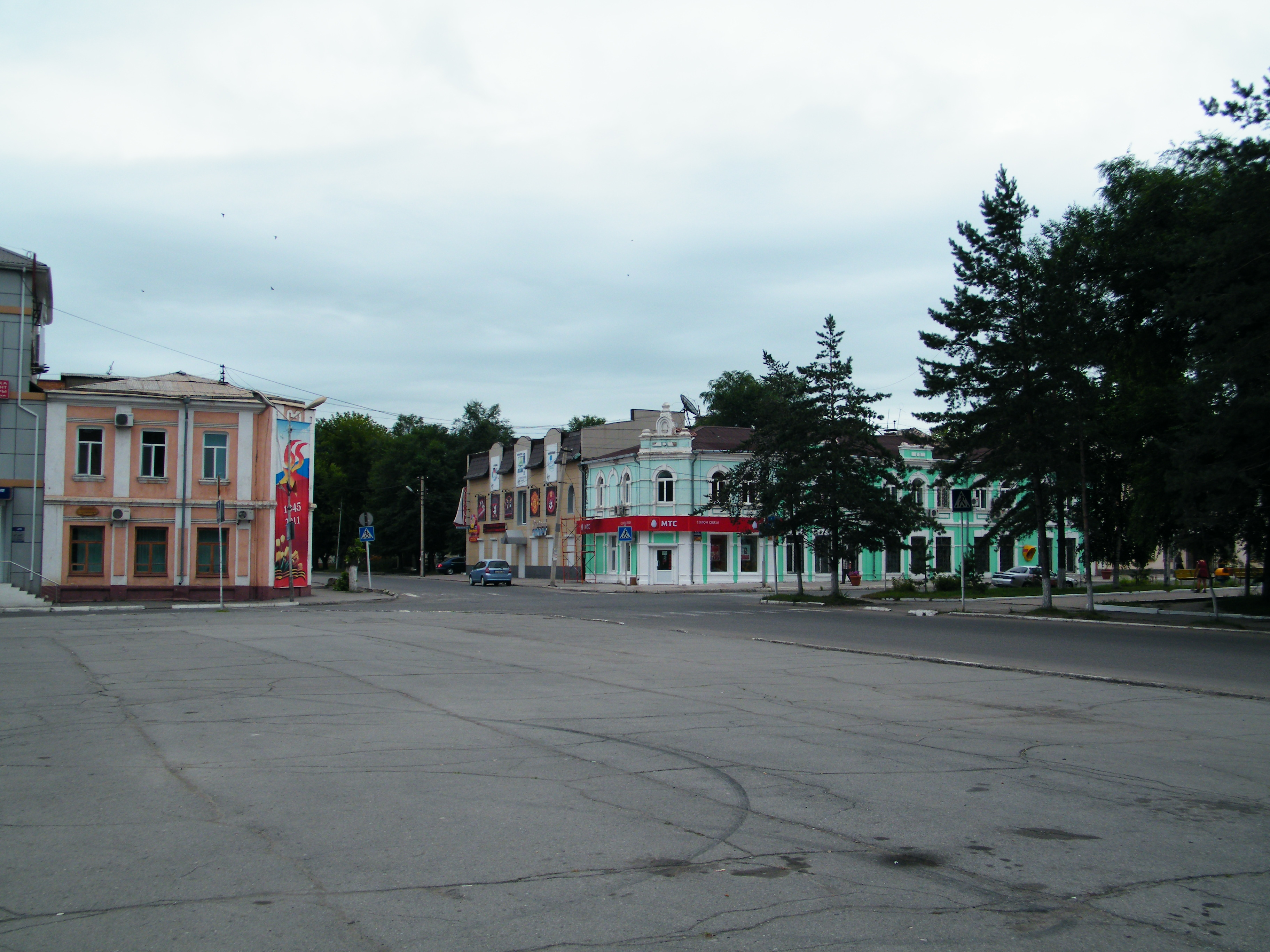 Город Спасск-Дальний